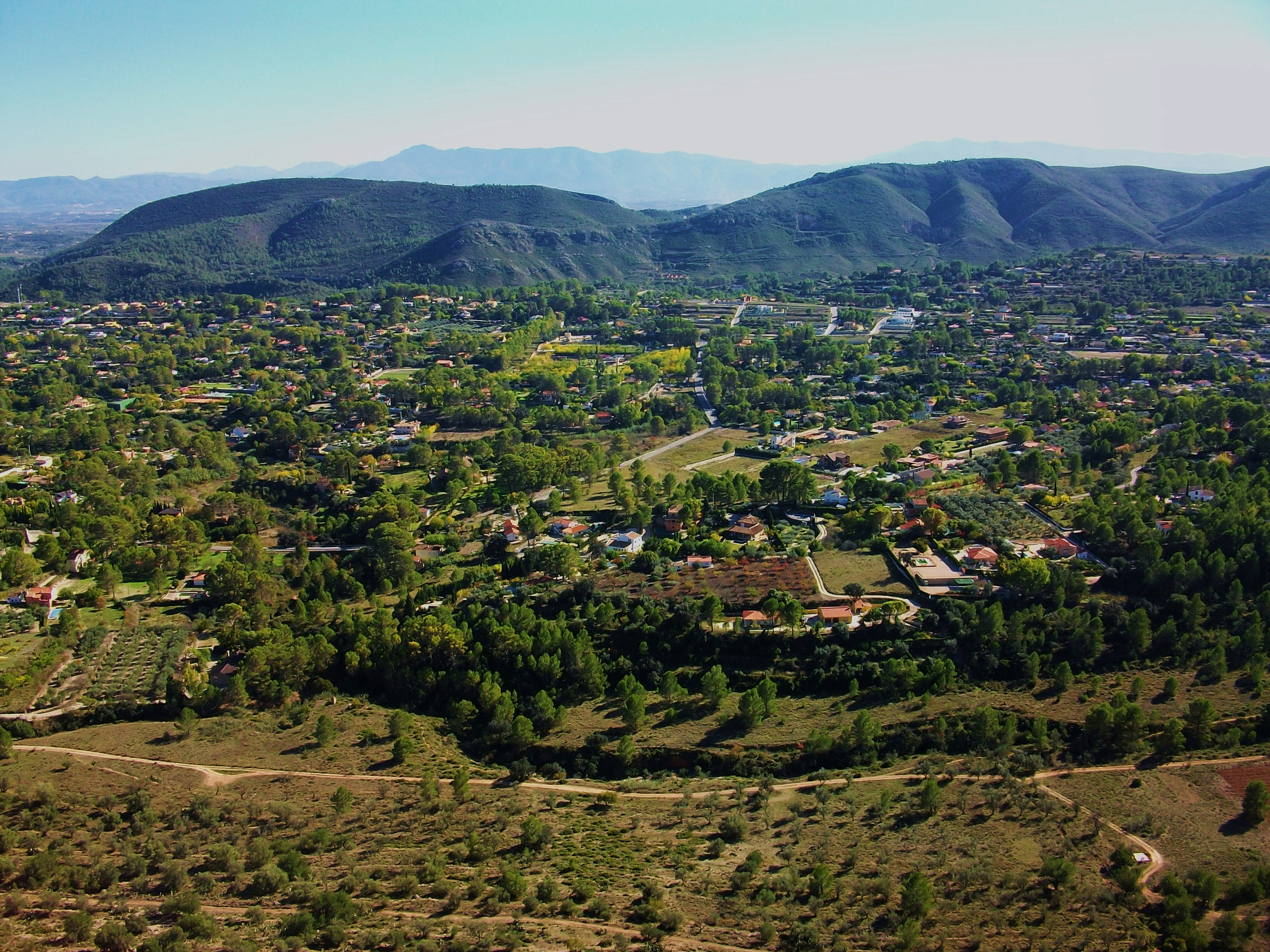 L'anomenat vall de Bixquert de Xàtiva, la Costera, País Valencià.